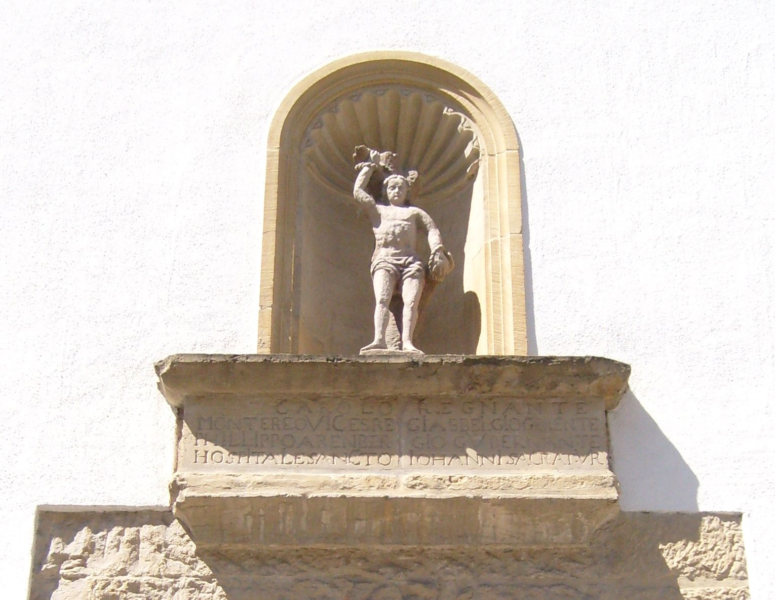 Niche lénks vun der Entrée vum Naturmusée.